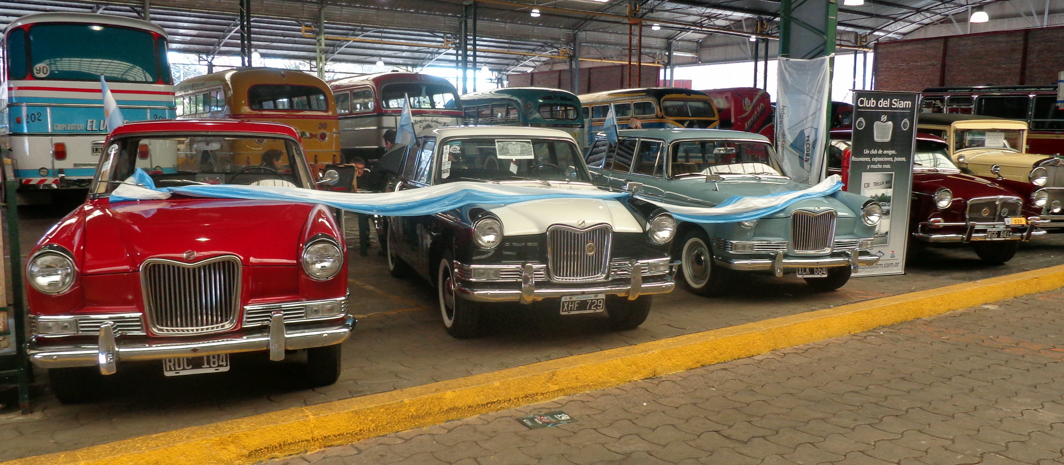 Exposición de autos y colectivos antiguos en el centro municipal El Dorrego. Buenos Aires, Argentina.